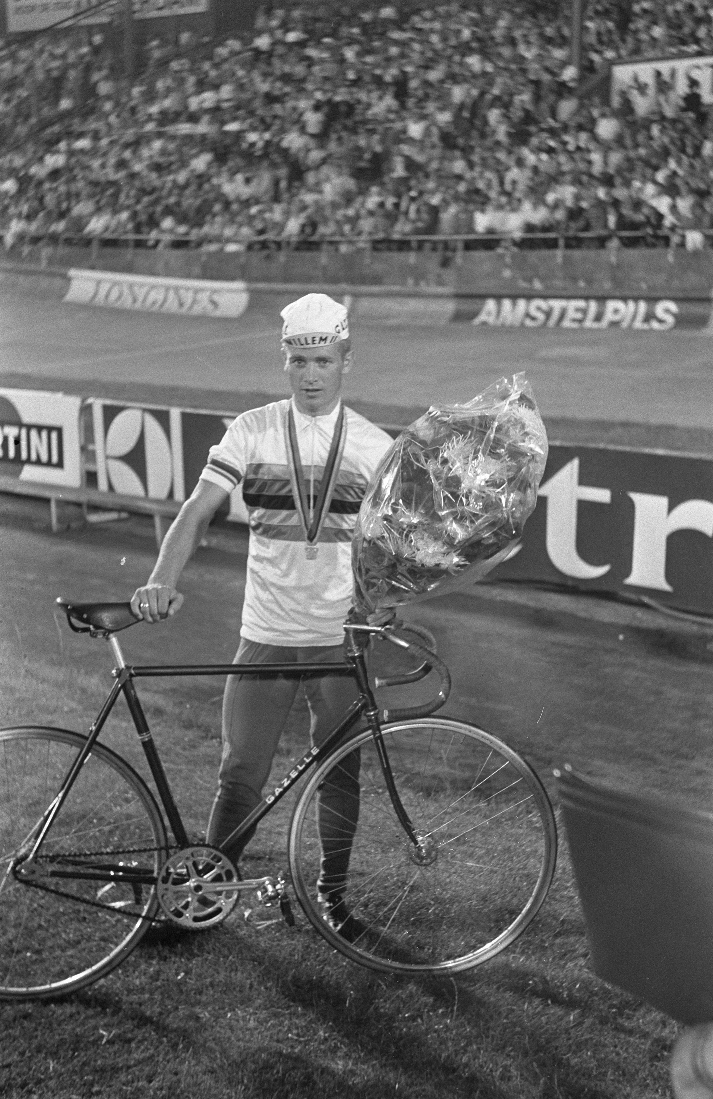 Collectie / Archief : Fotocollectie Anefo Reportage / Serie : [ onbekend ] Beschrijving : Wereldkampioensch. wielrennen op de weg, Ottenbros bij fiets Datum : 11 augustus 1969 Trefwoorden : WIELRENNEN Persoonsnaam : Ottenbros, Harm Fotograaf : Evers, Joost / Anefo Auteursrechthebbende : Nationaal Archief Materiaalsoort : Negatief (zwart/wit) Nummer archiefinventaris : bekijk toegang 2.24.01.05 Bestanddeelnummer : 922-6993